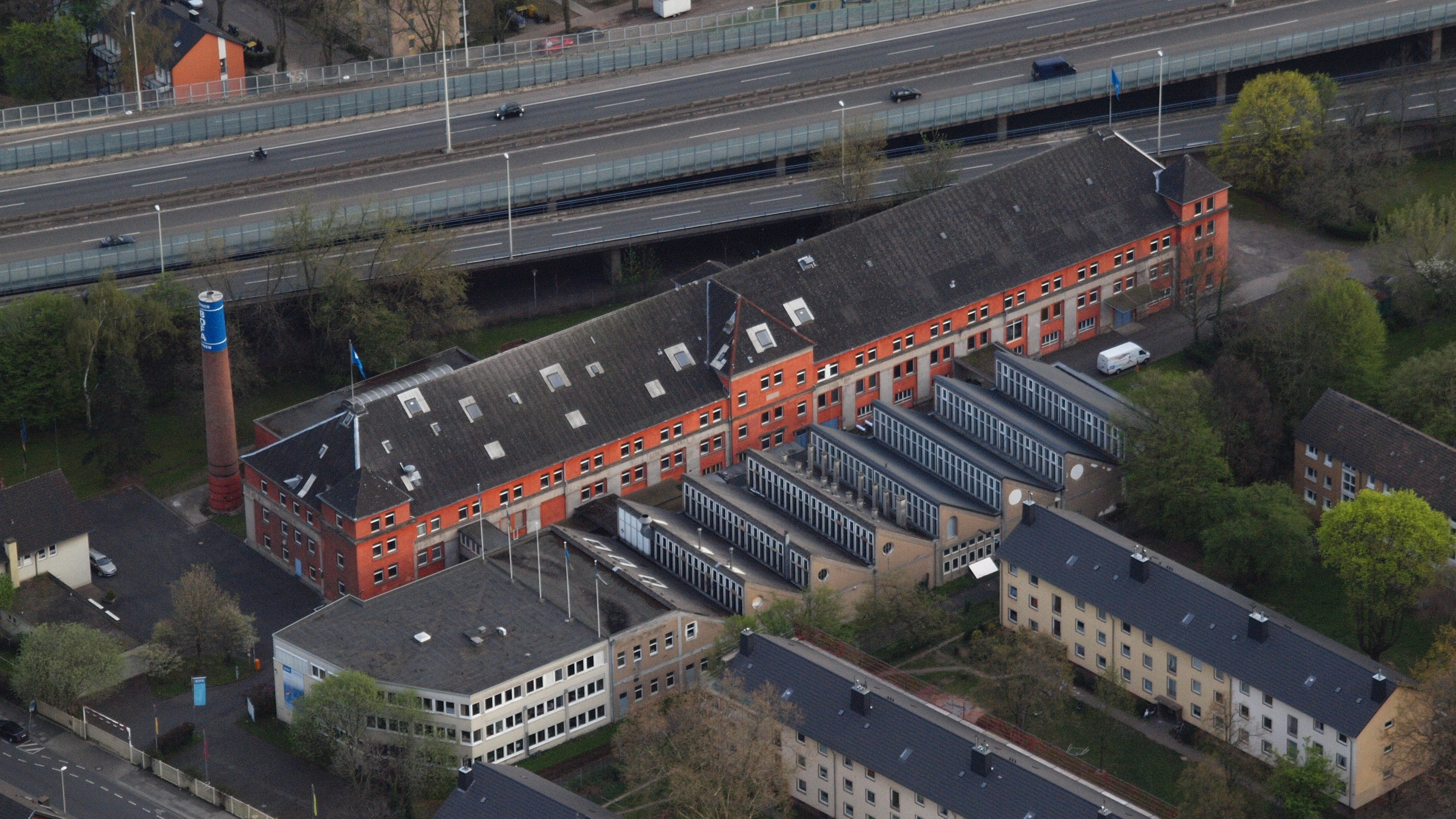 Bonner Fahnenfabrik, Römerstraße 303–305, Bonn-Graurheindorf: Luftaufnahme; hinten die Bundesautobahn 565